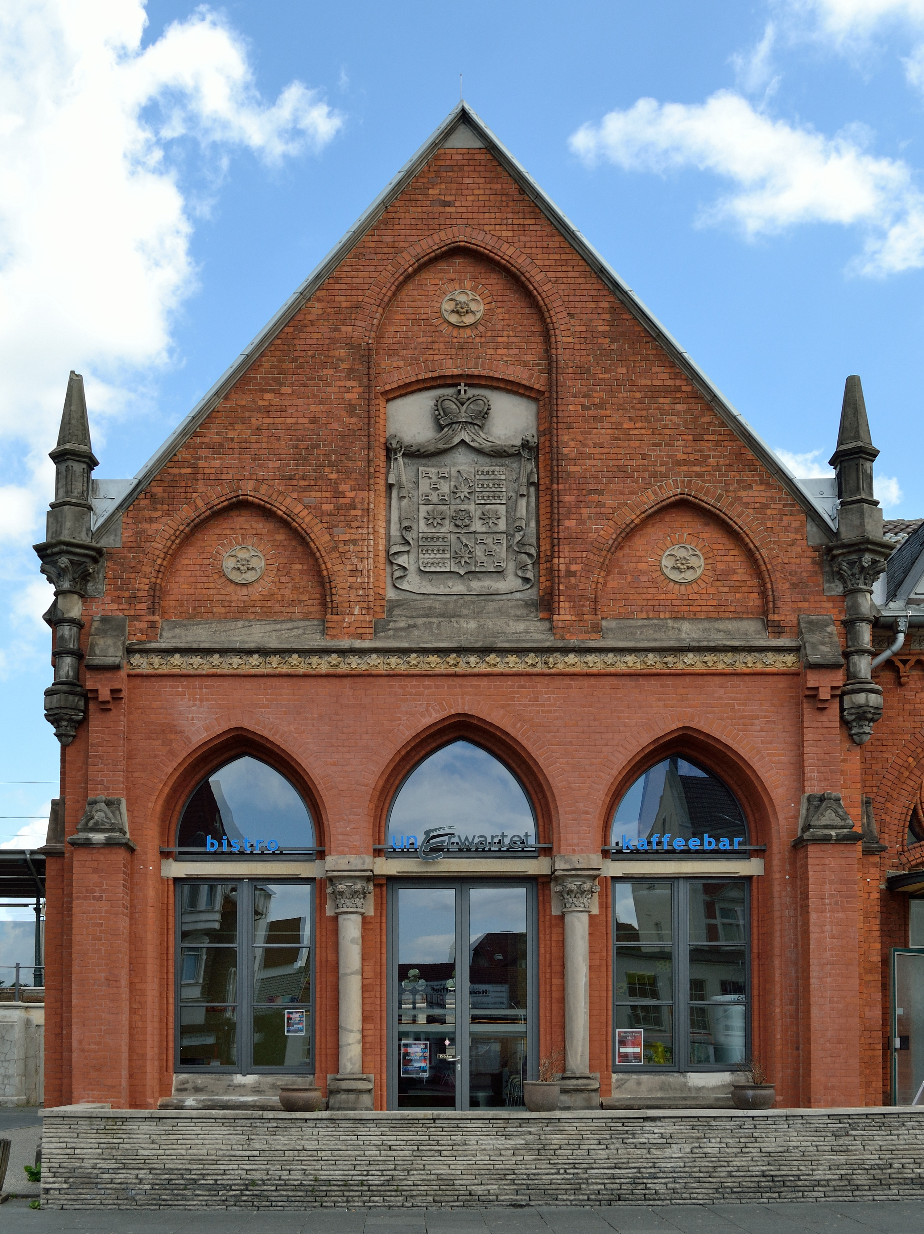 Außenansicht des ehemaligen Fürstenzimmer am Detmolder Bahnhof